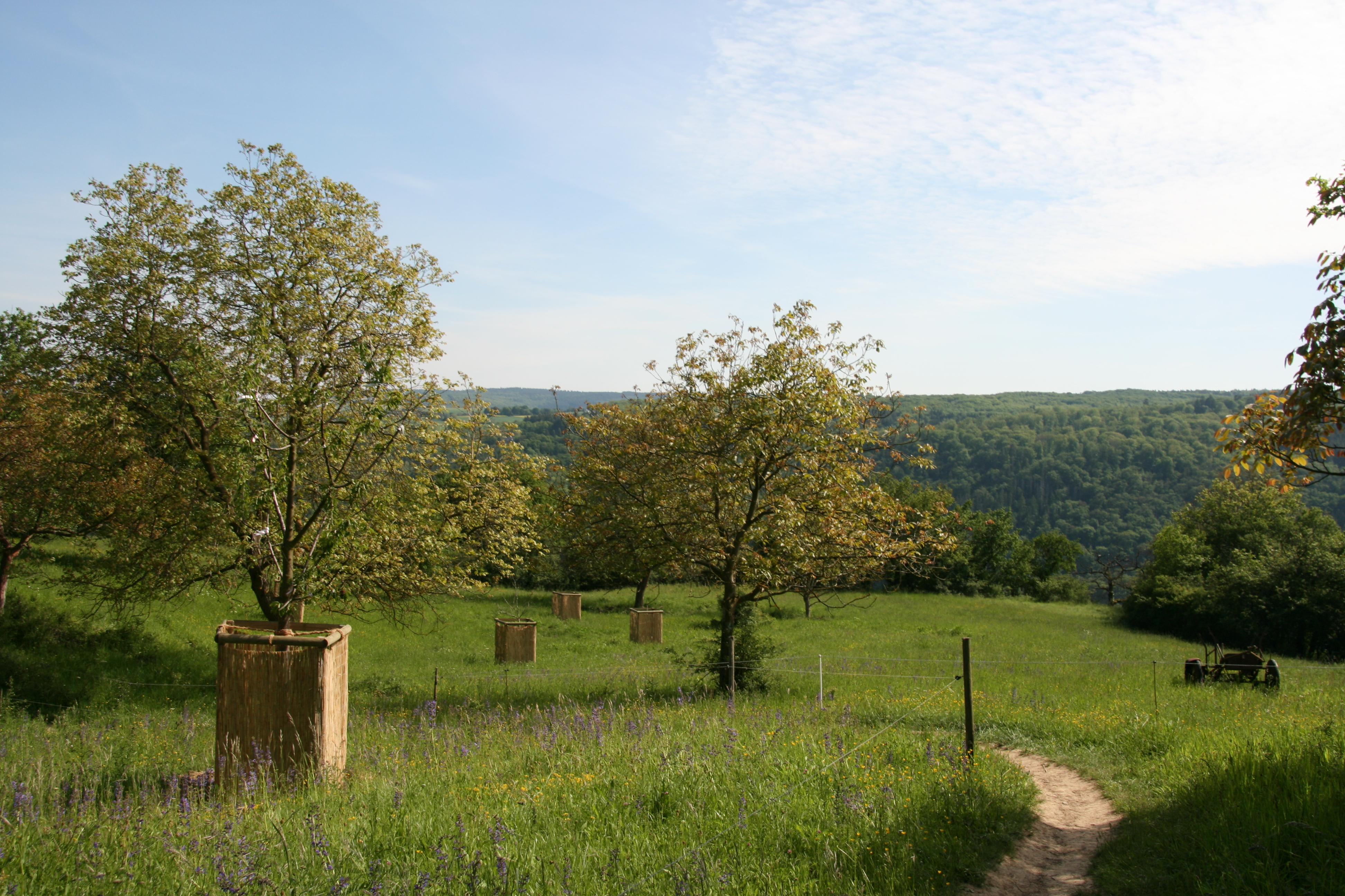 Der Rheinsteig führt über die Wiesen des Ehrenthaler Hahns, St.Goarshausen-Ehrenthal, Rheinland-Pfalz